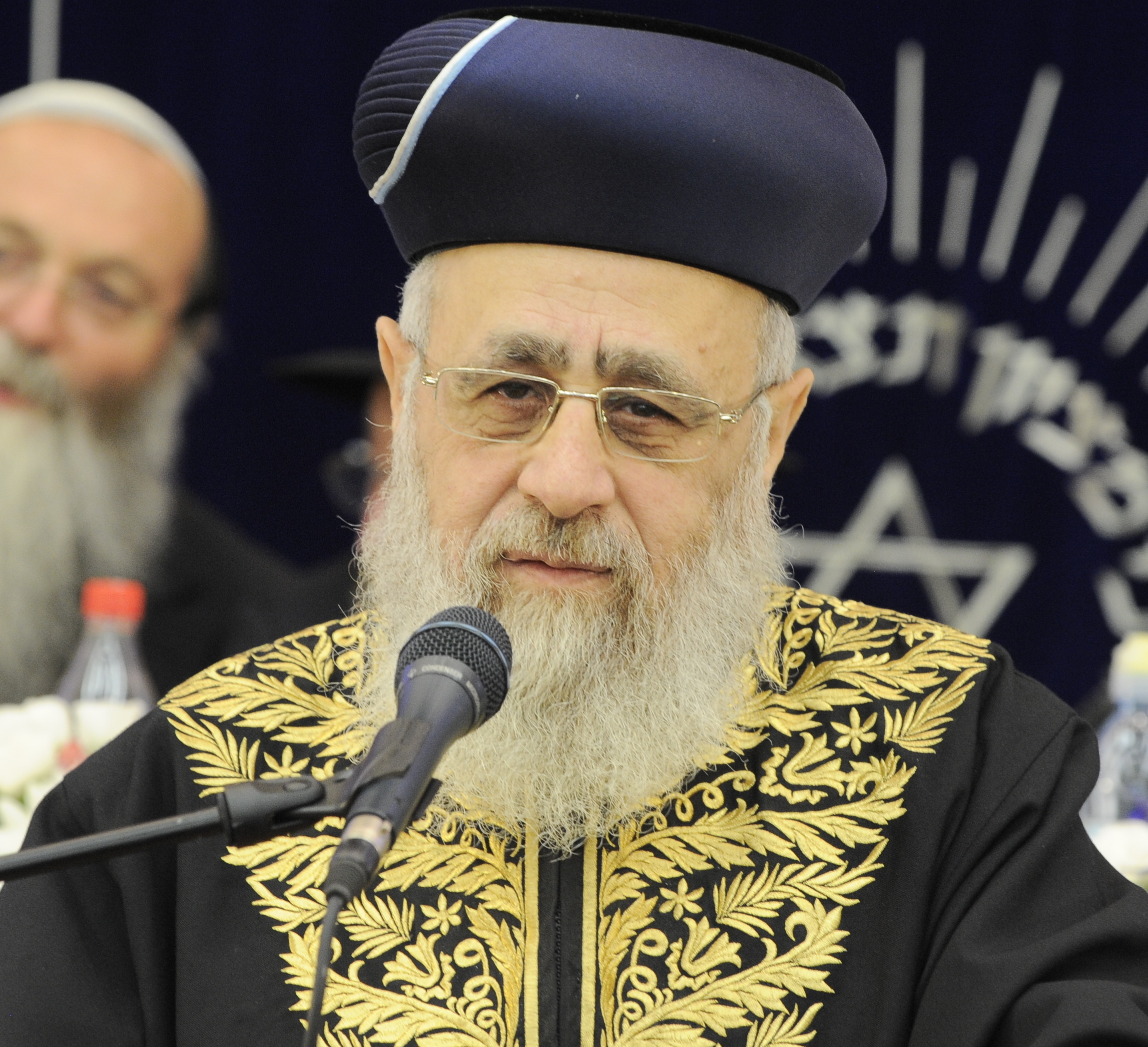 ישיבת מרכז הרב.